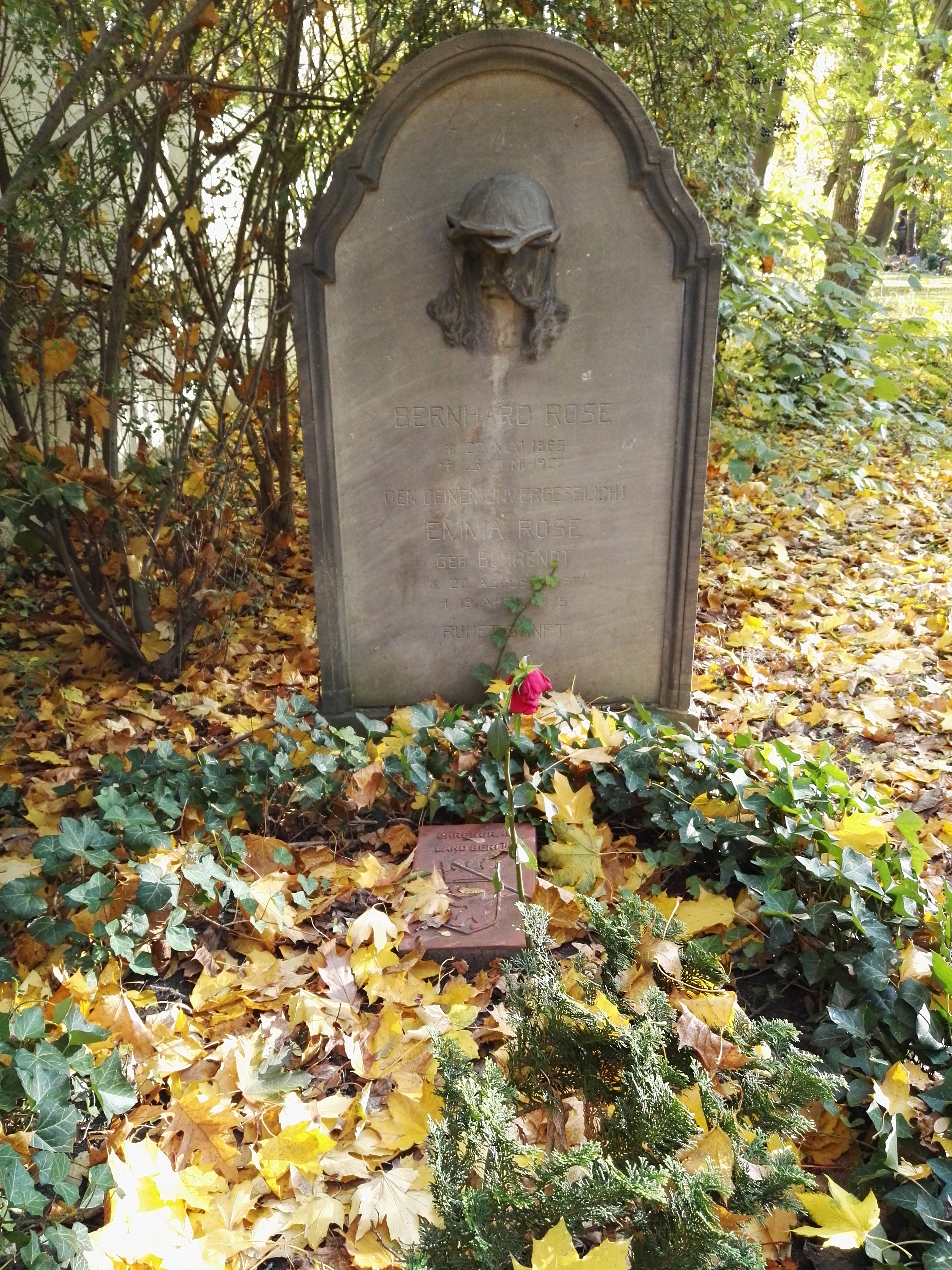 Grabstein für Bernhard Rose auf dem Georgen-Parochial-Friedhof II in Berlin-Friedrichshain; Ehrengrab